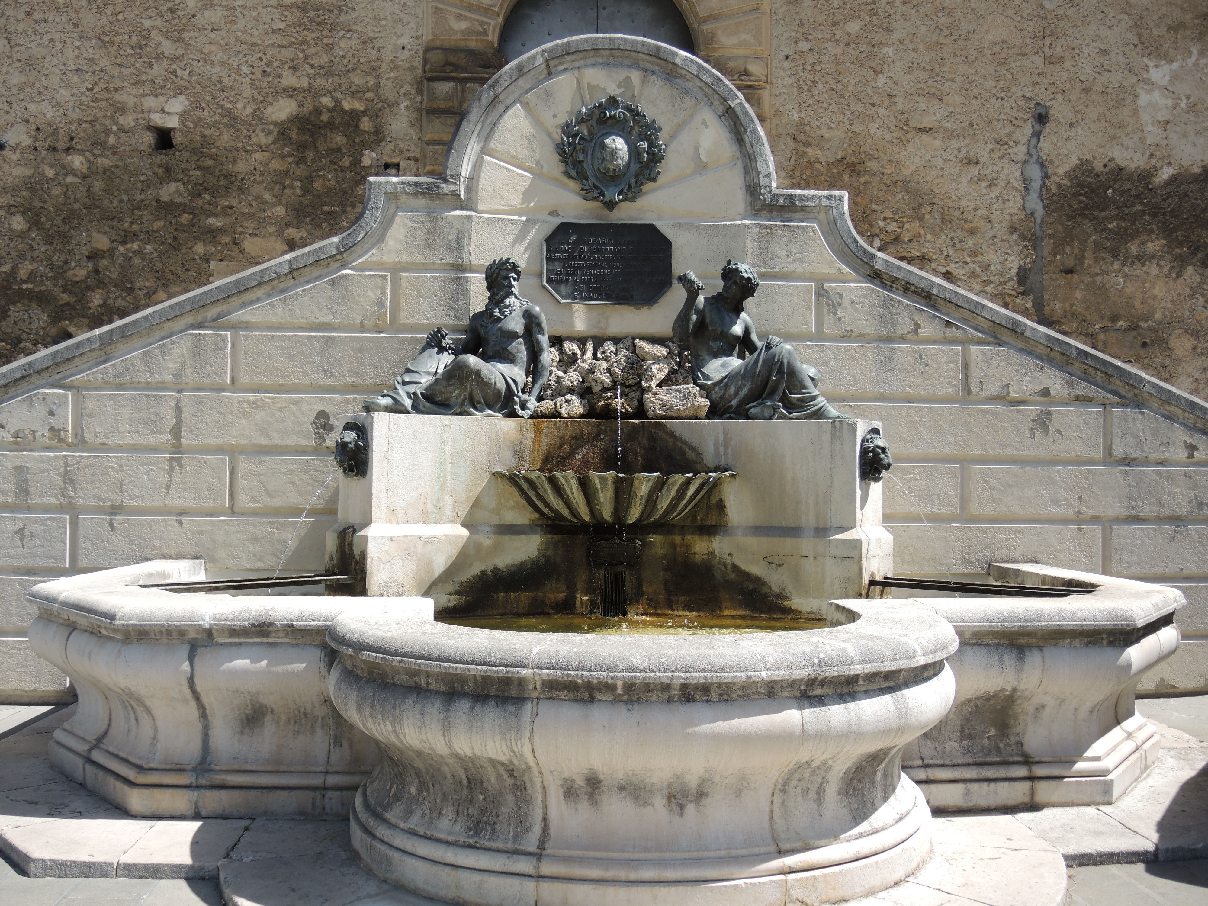 Pettorano sul Gizio